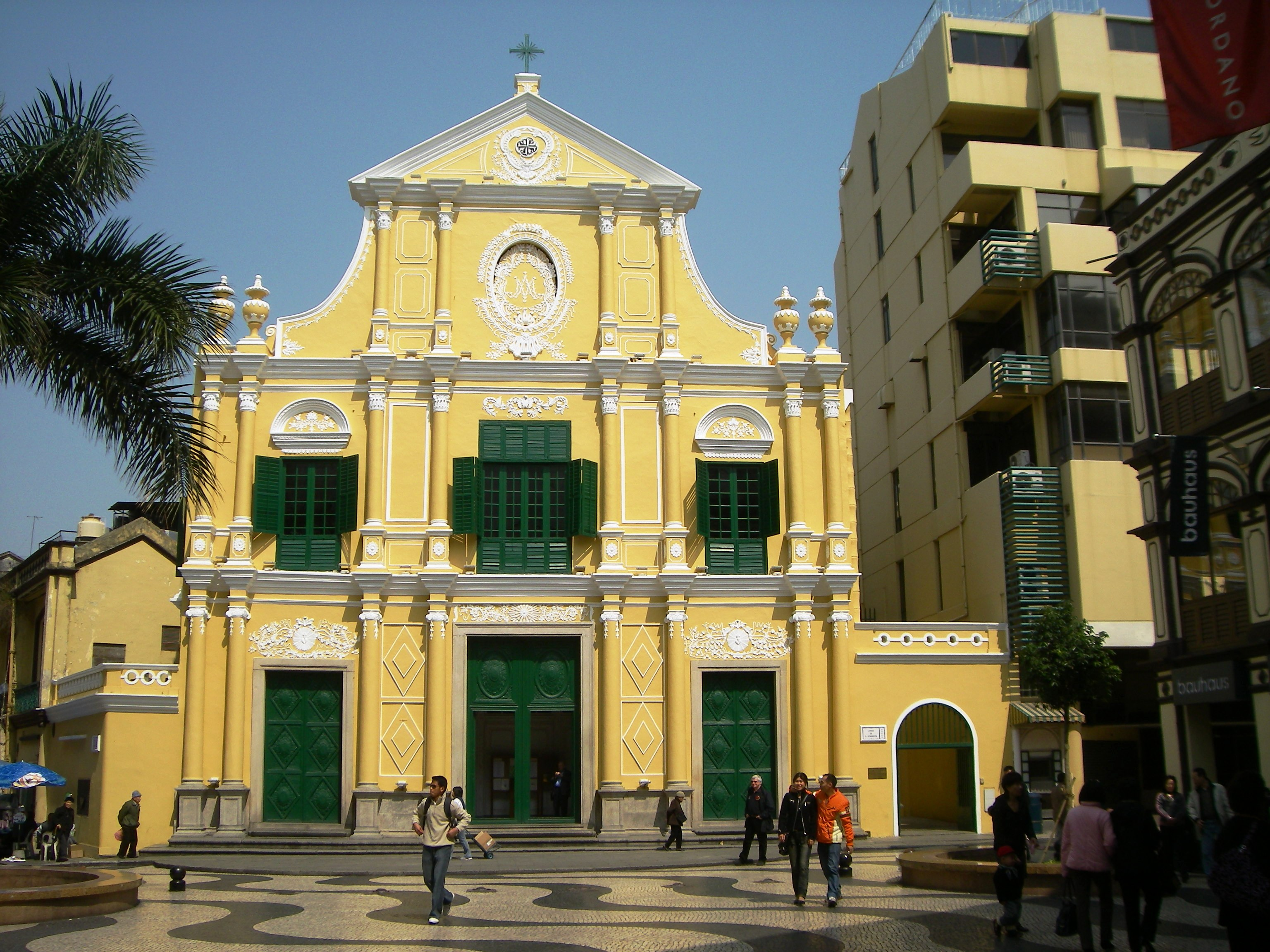 St Dominic's, Macau